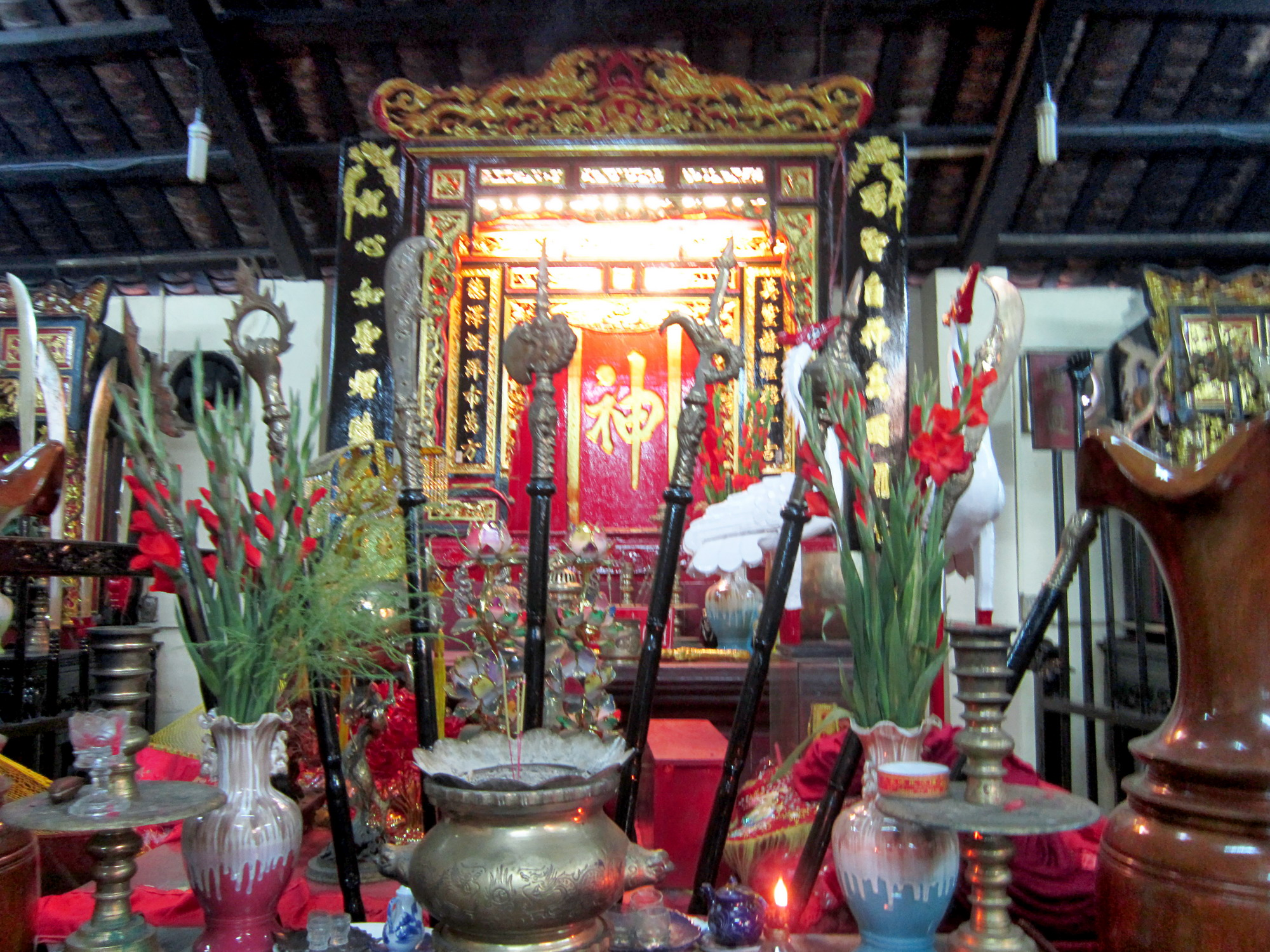 Bàn thờ Thần hoàng Bổn cảnh trong đình Chí Hòa, thuộc phường 13, quận 10, Thành phố Hồ Chí Minh, Việt Nam.